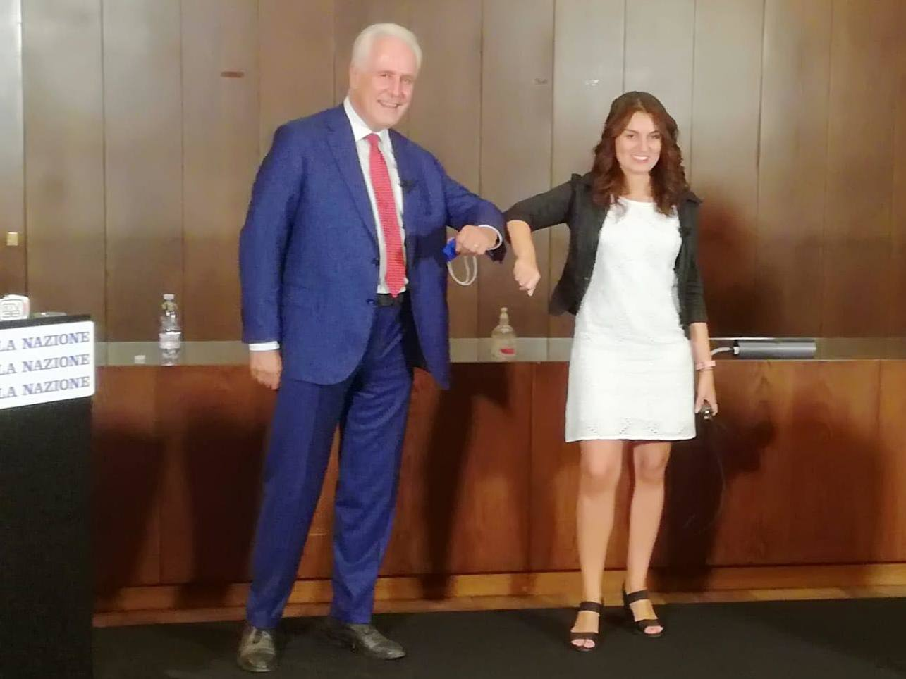 Incontro dei candidati alla carica di presidente della regione Toscana Eugenio Giani e Susanna Ceccardi presso l'auditorium de "La Nazione" a luglio, in vista delle elezioni del settembre 2020